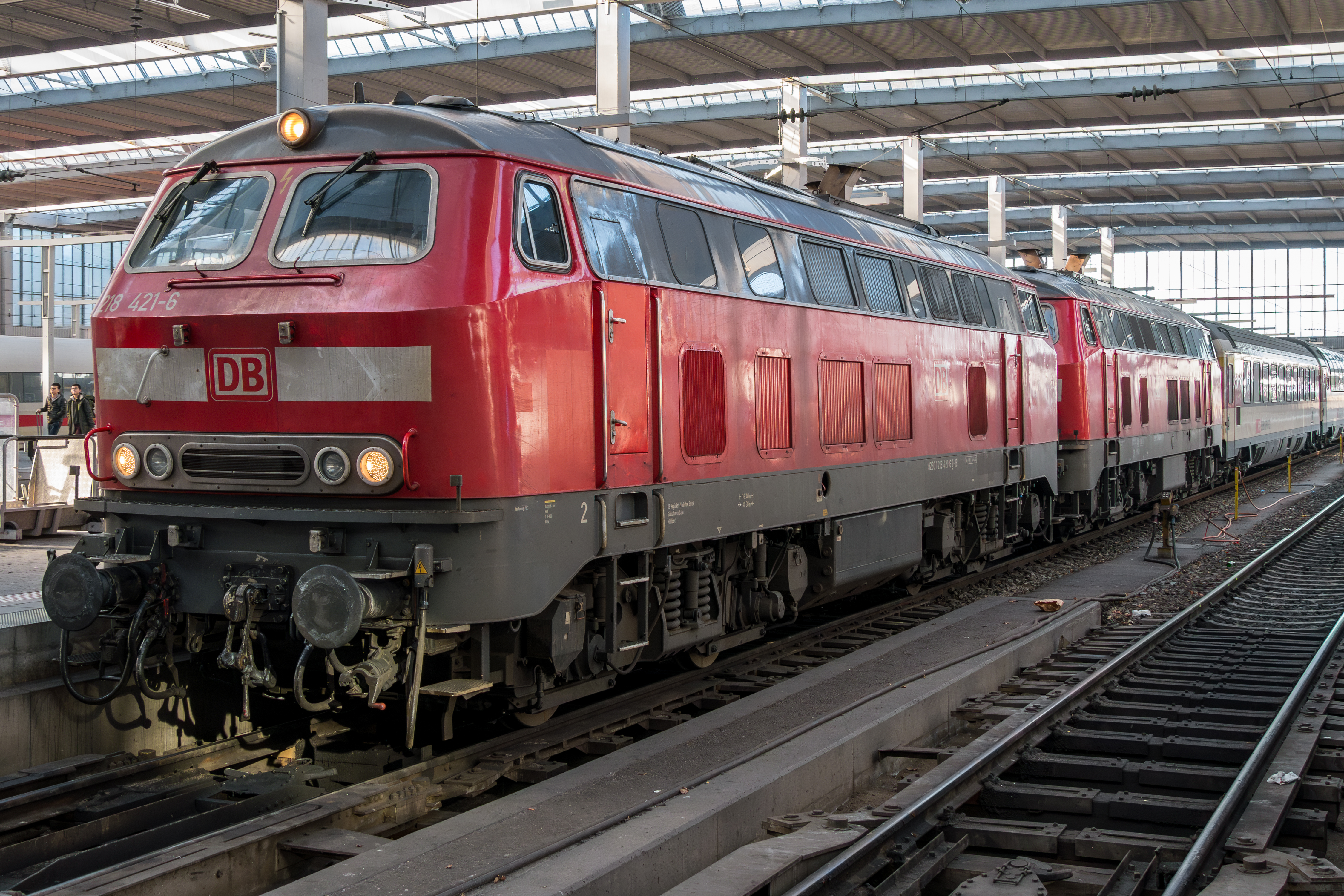 2 DB-Dieselloks BR 218 mit dem EC von Zürich im Hauptbahnhof München.